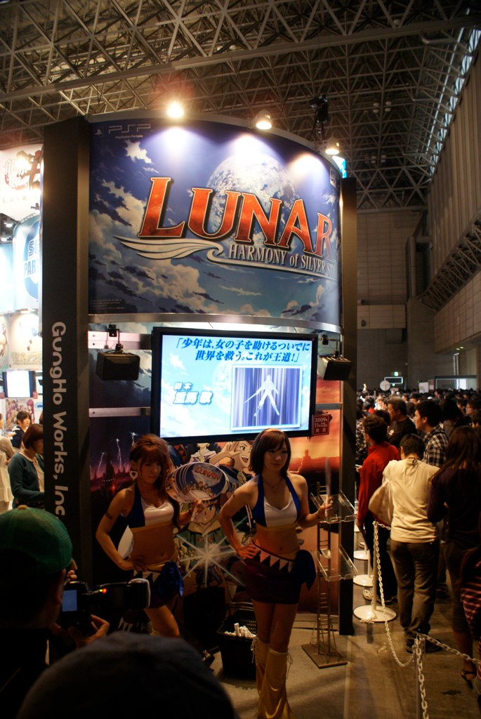 2009東京電玩展GungHo Works攤位，宣傳《Lunar: Harmony of Silver Star》。